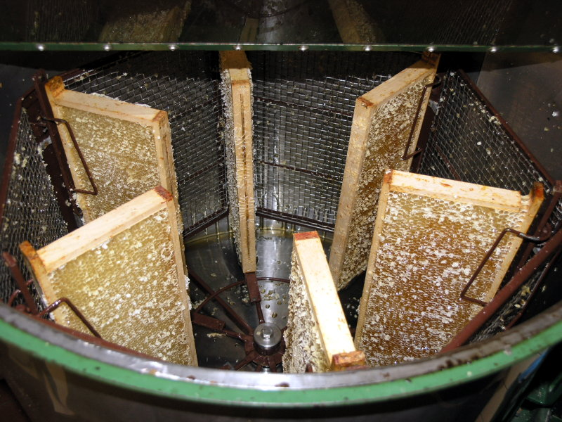 Imkerei in Bad Vöslau: Honigschleuder